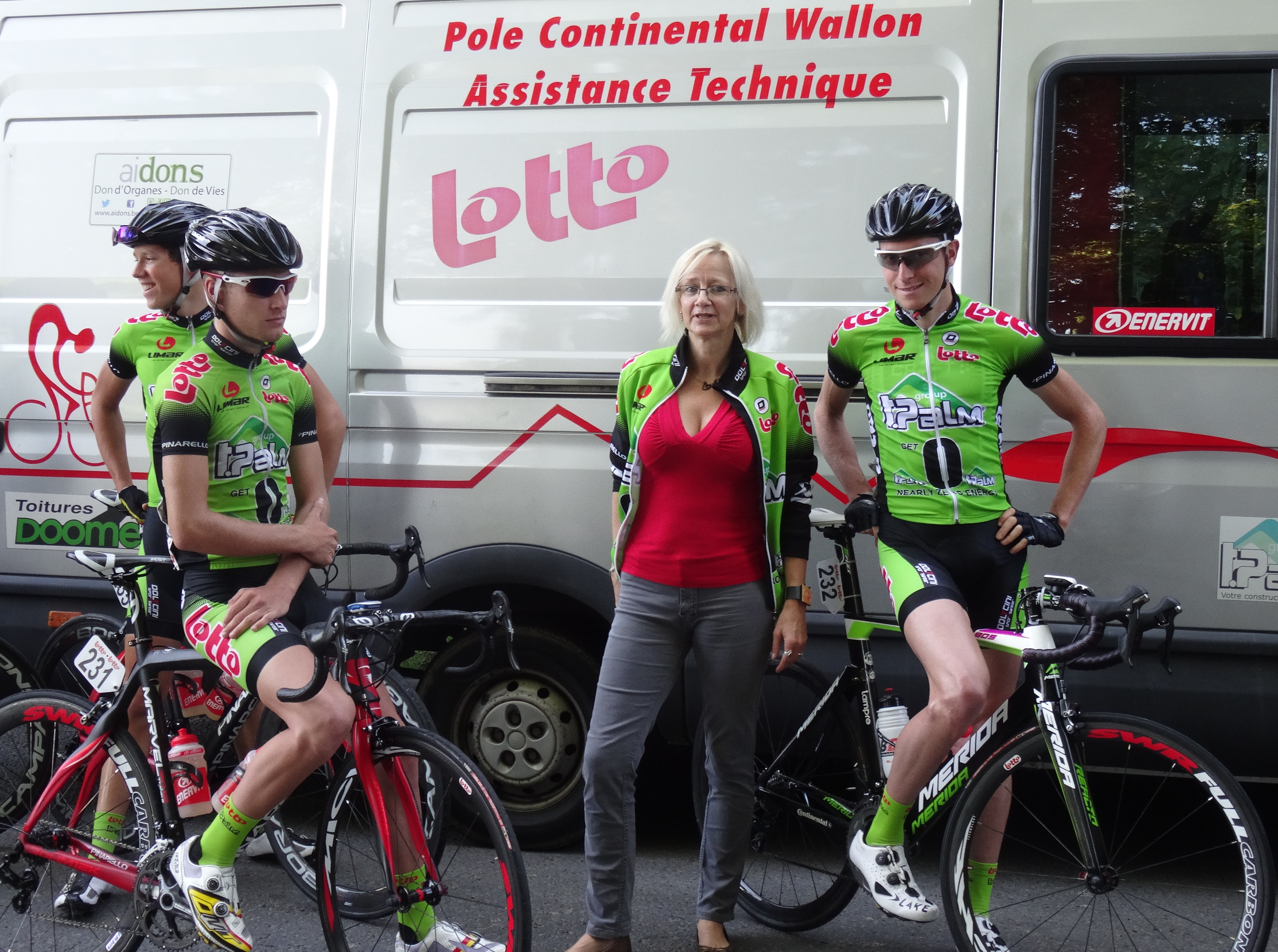 Reportage photographique réalisé le vendredi 3 octobre à l'occasion du départ de la deuxième étape de l'Eurométropole Tour 2014 à Estaimbourg (Estaimpuis), Belgique.